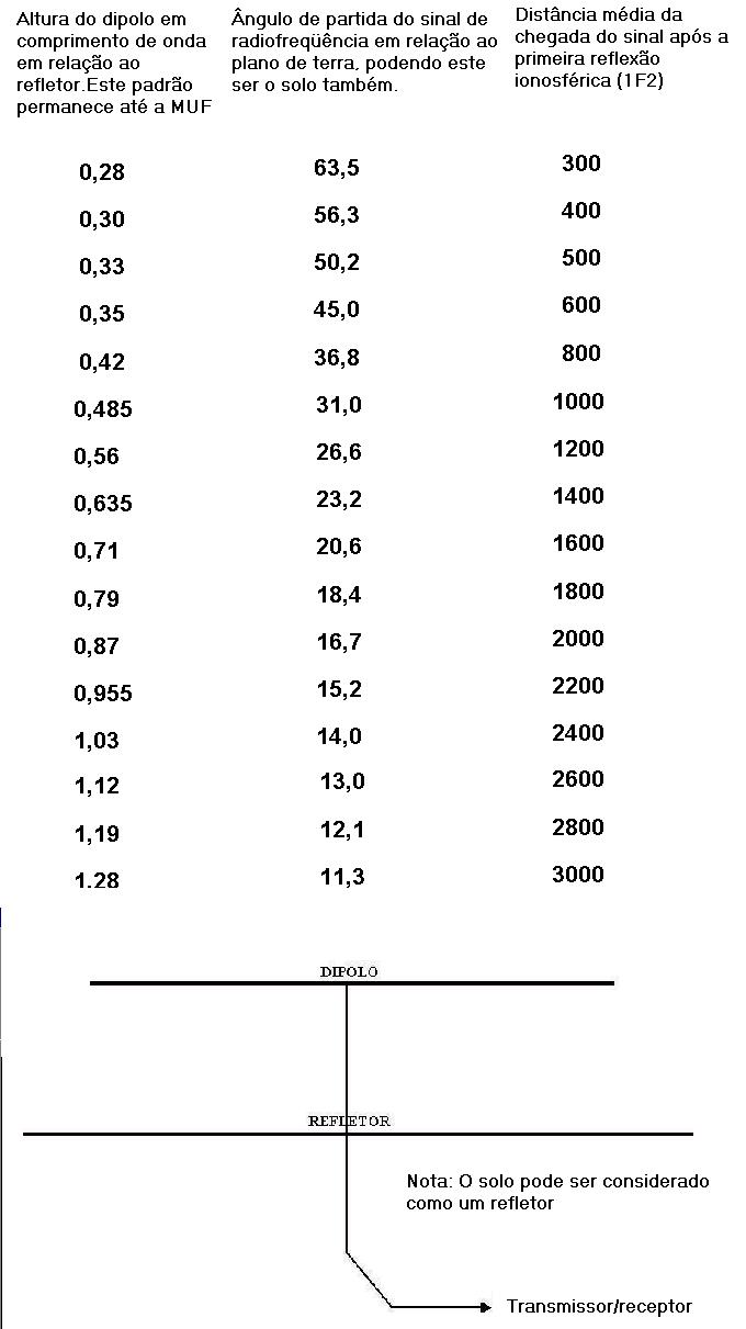 Tabela de reflexão ionosférica do sinal de radiofreqüência até a MUF. Nota: A distância média de chegada do sinal (coluna direita) é dada em quilômetros. By Angeloleithold 1969